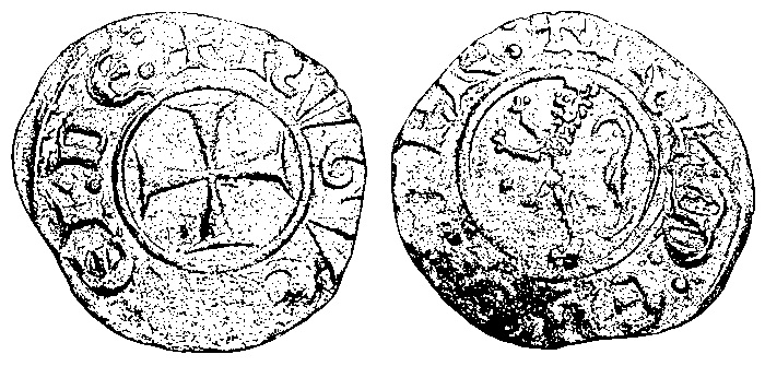 Denario de Hugo III de Chipre.